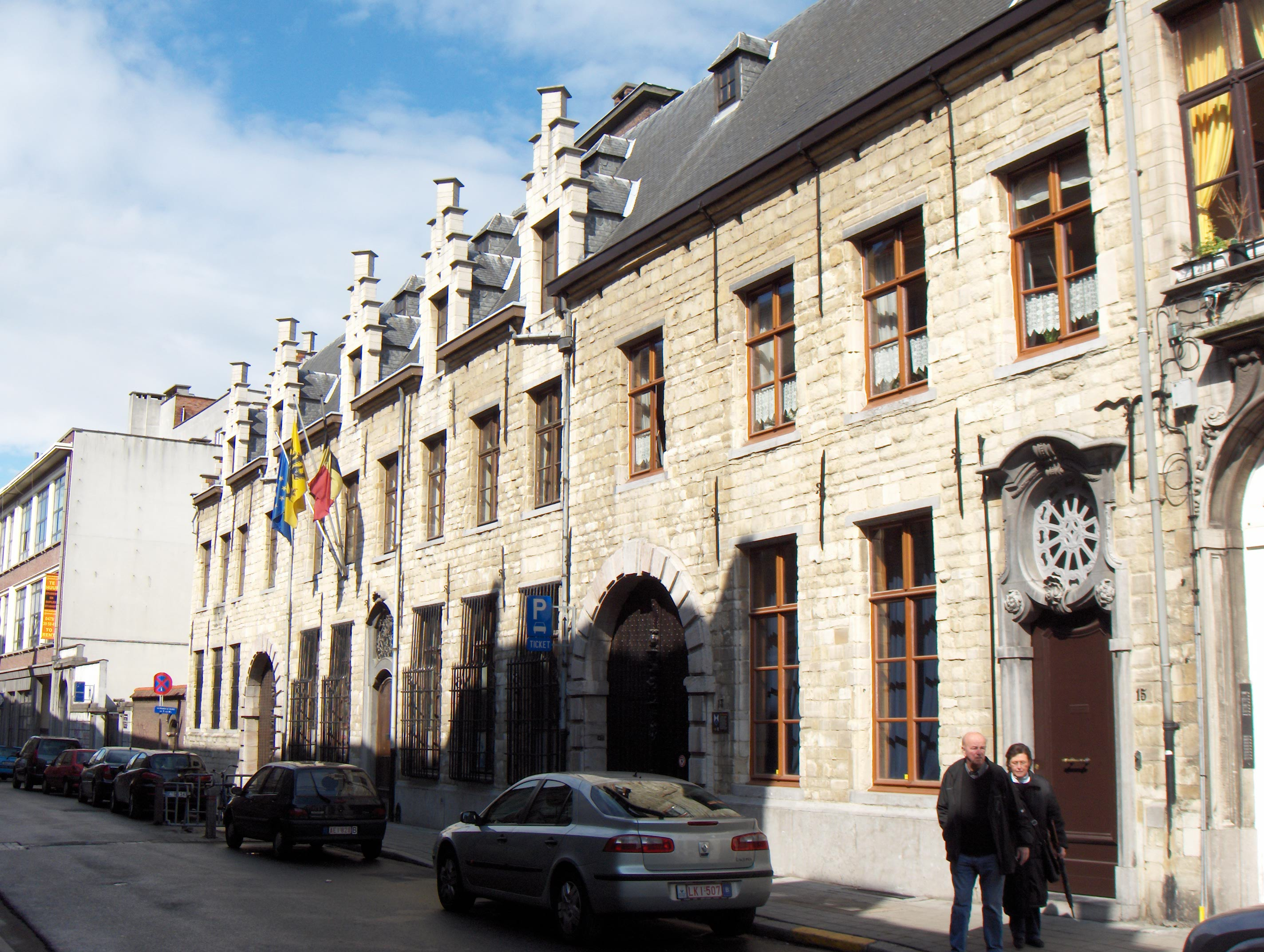 Beschreibung: Der Mons Pietatis zu Antwerpen (Berg van Barmhartigheid) in der Venusstraat, 1625. Architekt: Wenceslas Coebergher.